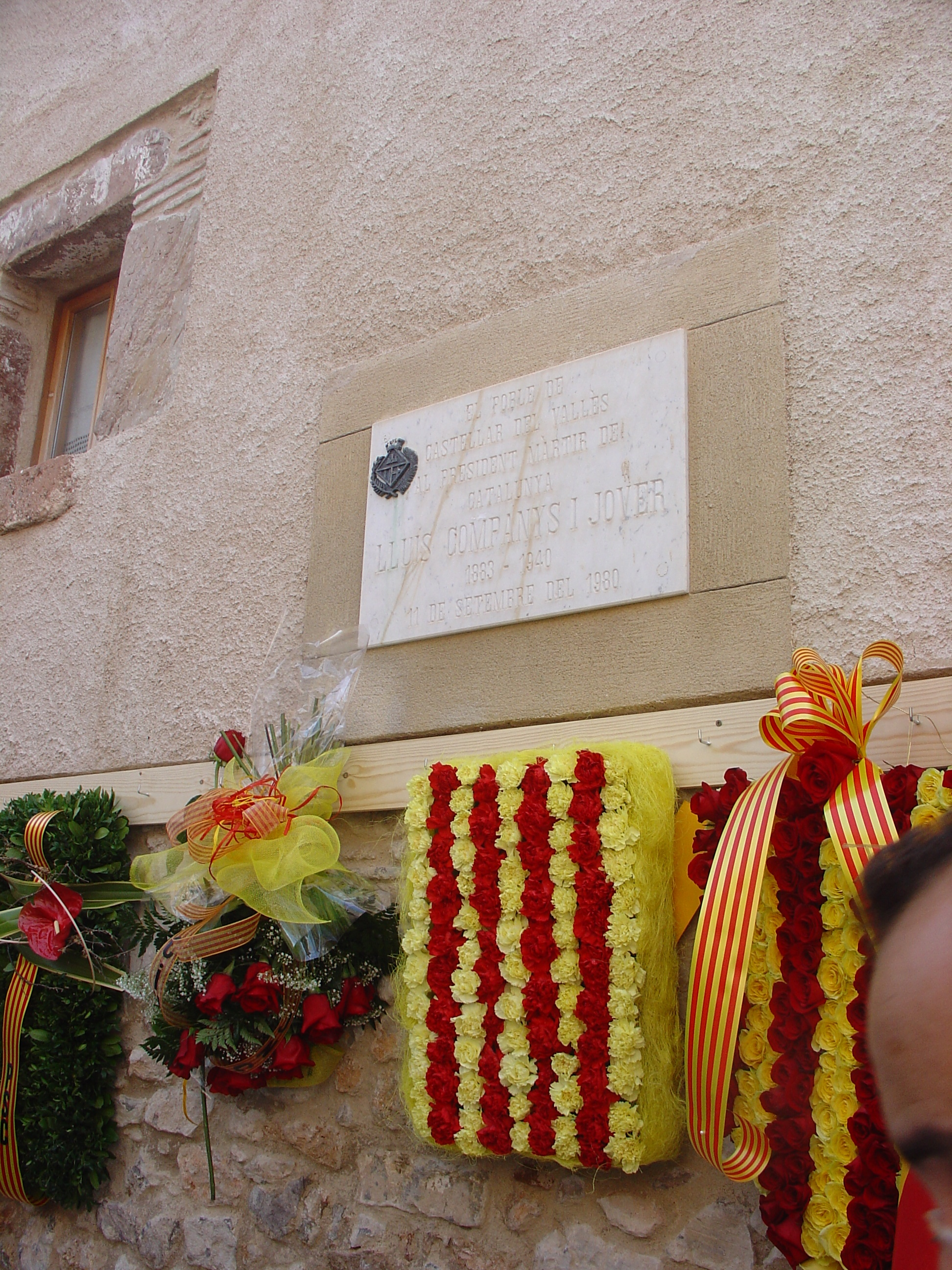 Lluís Companys' summer house at Castellar del Vallès during 2008 Diada Nacional de Catalunya